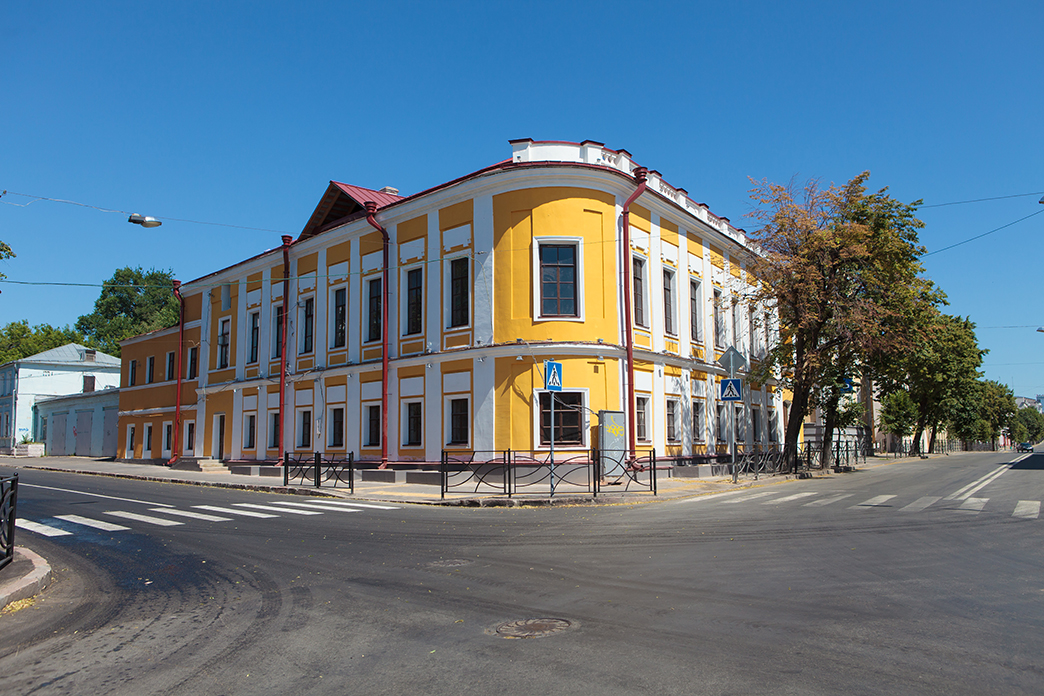 г.Казань, ул.К.Маркса, 11. Памятник архитектуры регионального значения